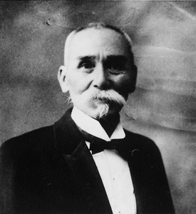 中国海产业先驱张尊山先生像